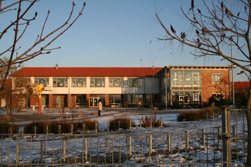 Irxleben: Grundschule (Bild selbst gemacht, Dez 2005)